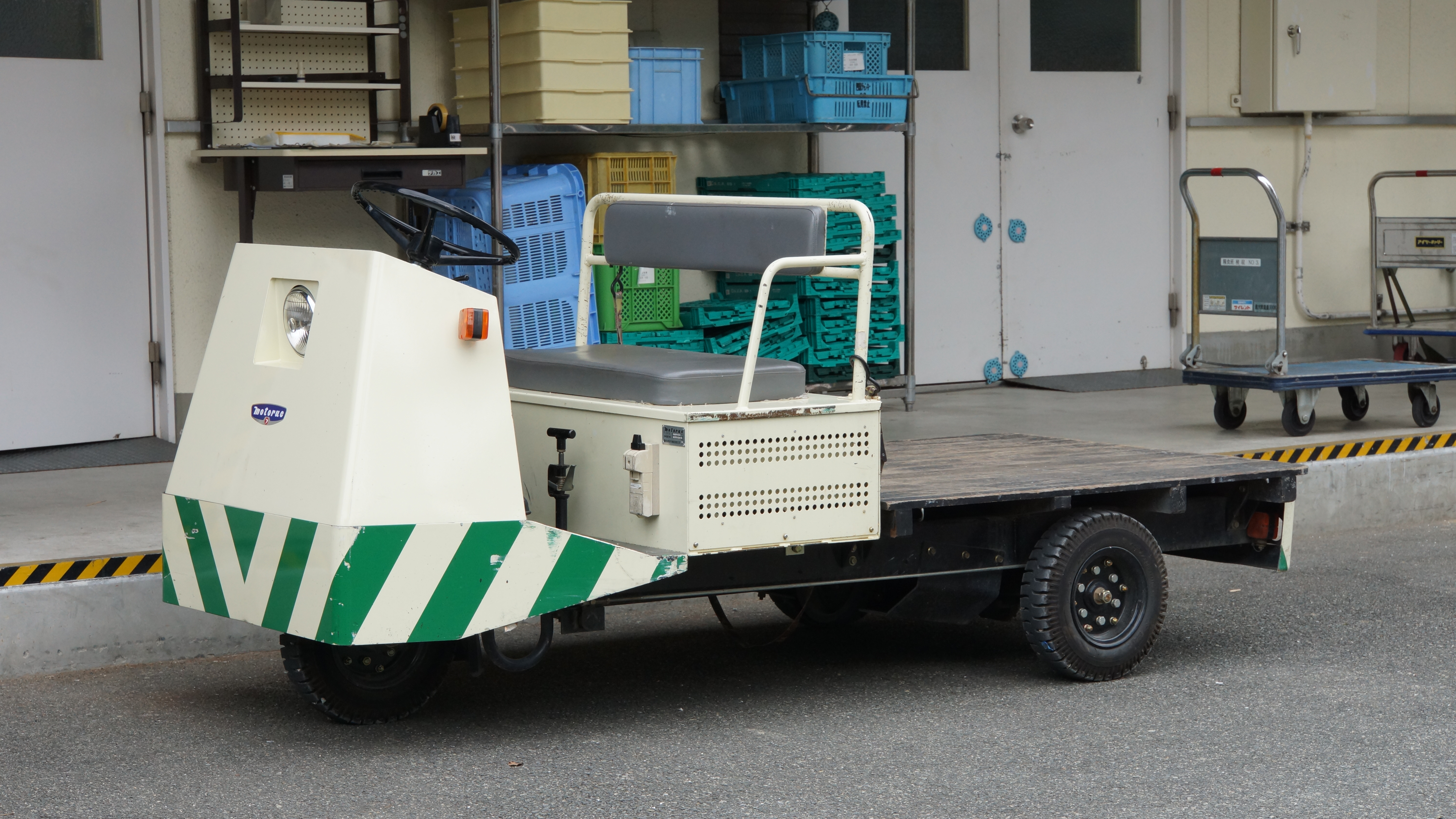 陸上自衛隊 構内運搬車（富士重工業製 モートラック）。 2015年9月13日 伊丹駐屯地にて。